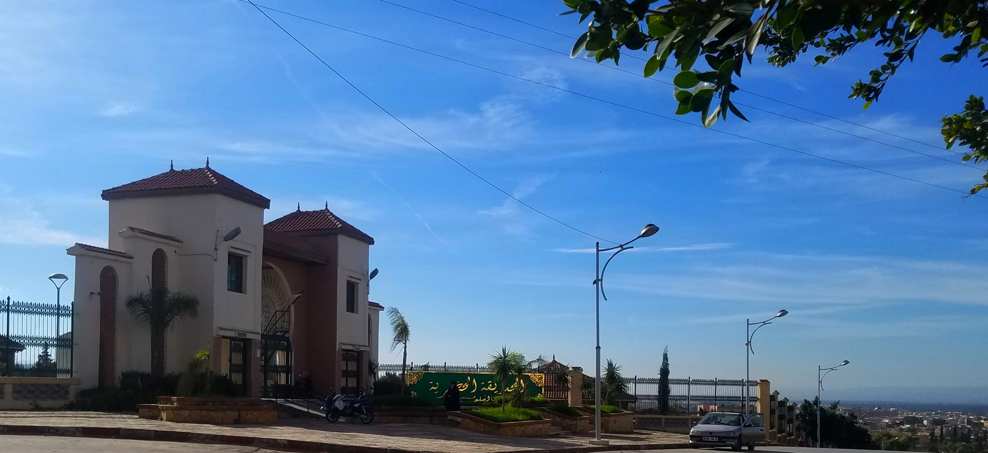 Parc de loisirs Hay Nasr Chlef